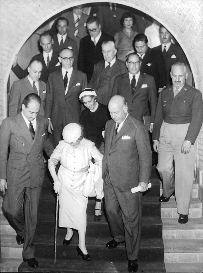 Regina Pacini de Alvear, acompañada por el presidente Arturo Frondizi, asiste a la inauguración de la sala dedicada a su marido en el Museo de la Casa de Gobierno, 16 de octubre de 1958. Documento Fotográfico. Inventario 254287